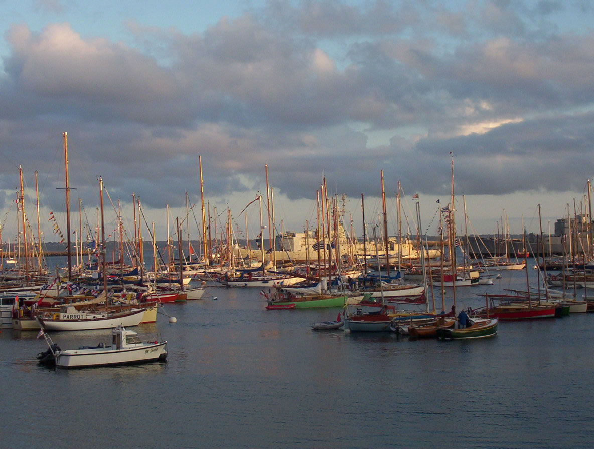 Brest 2004, rassemblement de voiliers dans le port.